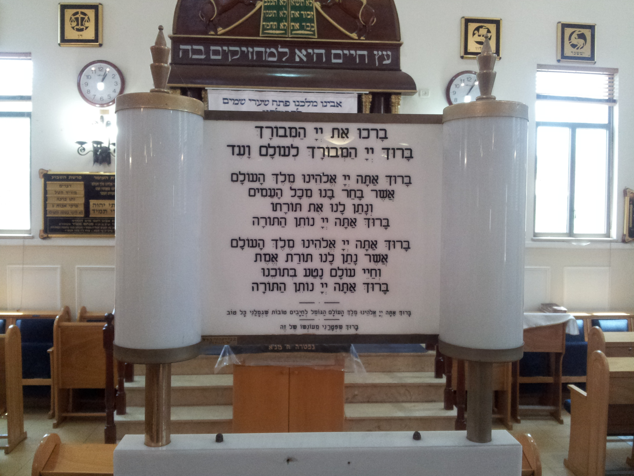 ברכת התורה בשלט בבית הכנסת הגדול בעפולה